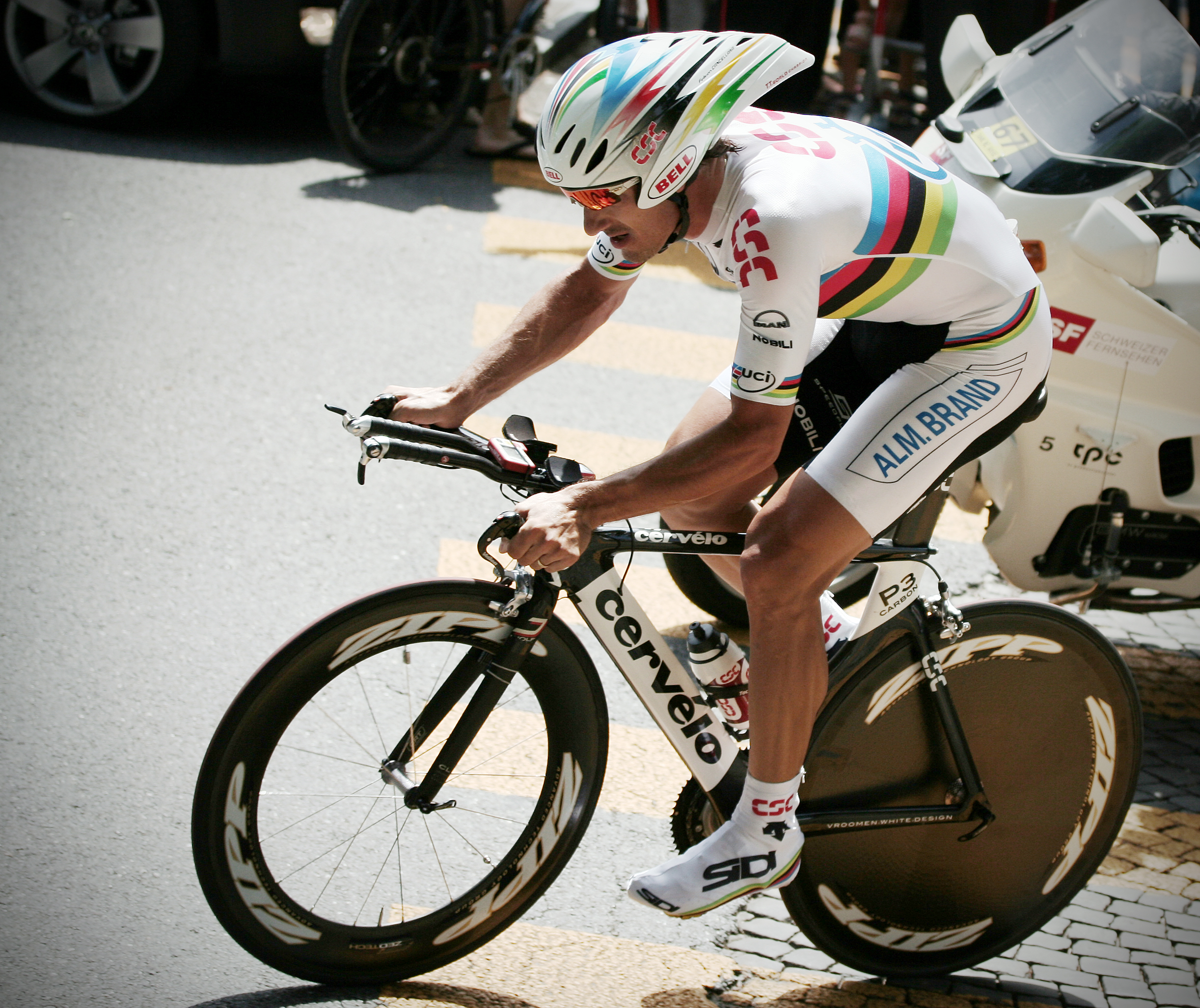 Fabian Cancellara, Bern, Switzerland (Einzelzeitfahren Tour de Suisse 2007) (Cancellara gewann diese Etappe)